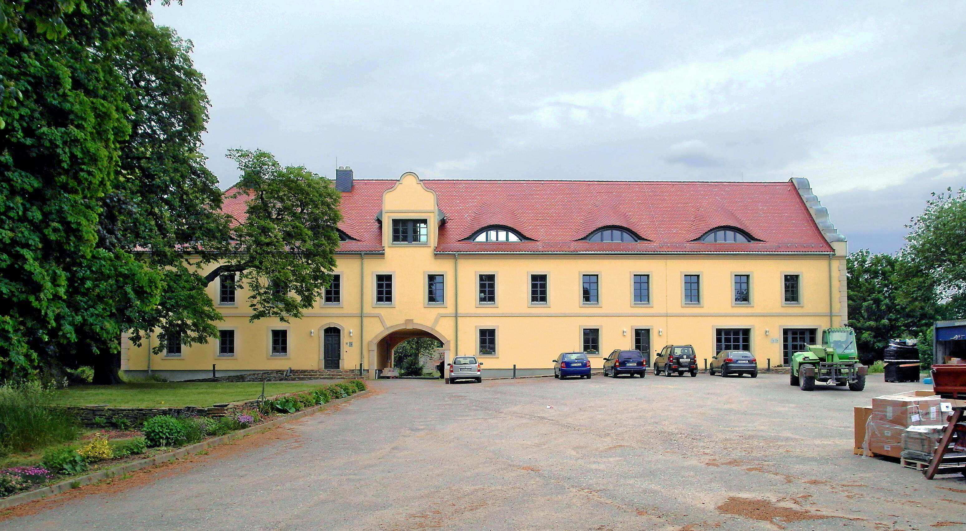 08.06.2015 09633 Halsbrücke-Neubau (Halsbrücke) Lossnitzer Weg 1 (GMP: 50.945776,13.334583): Ehem. Kanzleilehngut, Herrenhaus Neubau, hervorgegangen ist aus einem Vorwerk aus dem 16. Jh. Seit 2009 gründlicher Umbau und Sanierung. Bio-Bauernhof mit Direktvermarktung. [SAM0768.JPG]20150608200DR.JPG(c)Blobelt